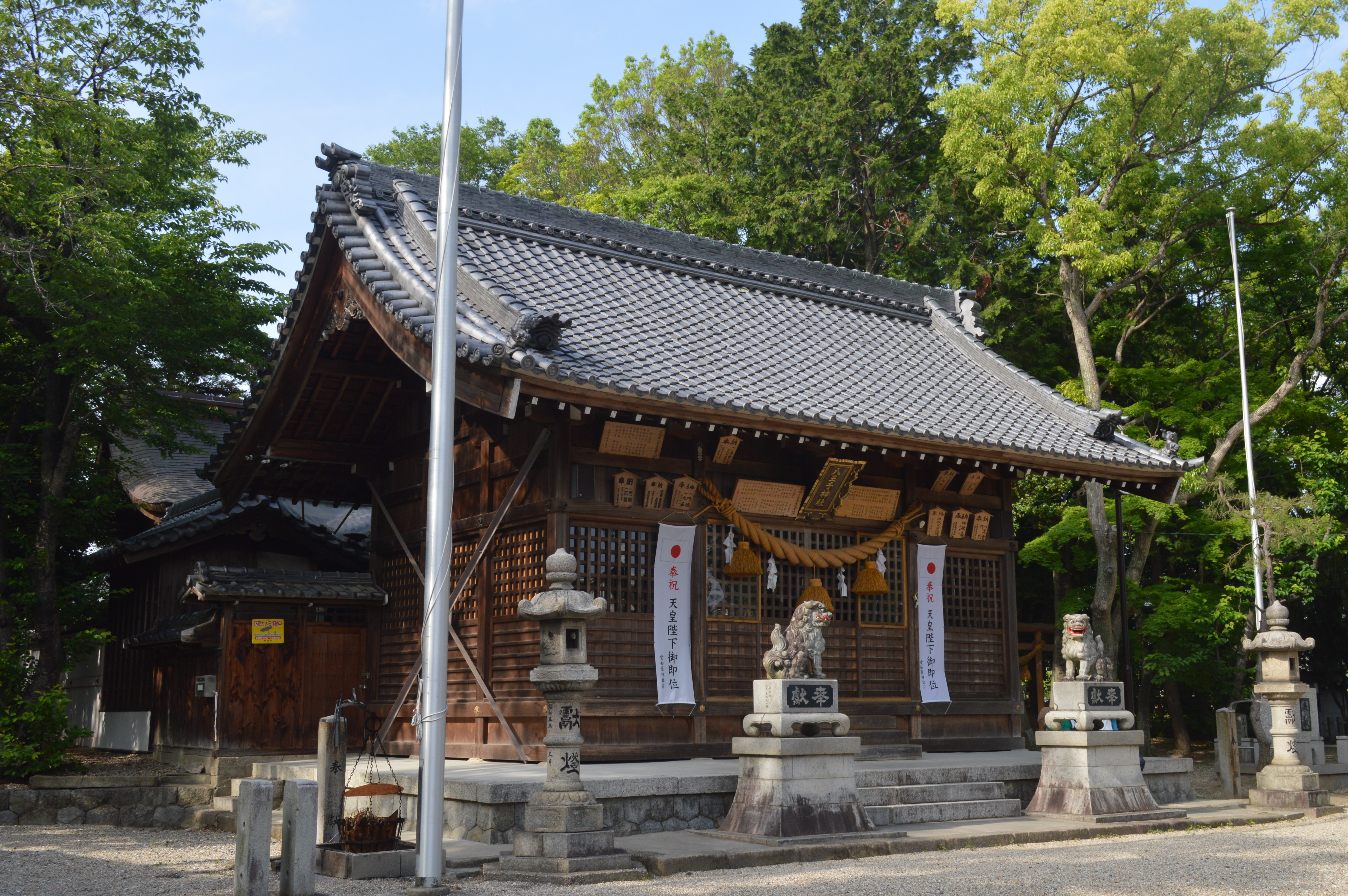 愛知県刈谷市泉田町にある八王子神社。